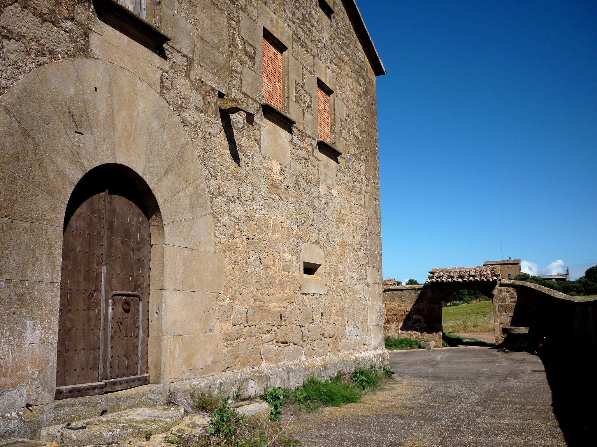 Masia de Padollers (Biosca)